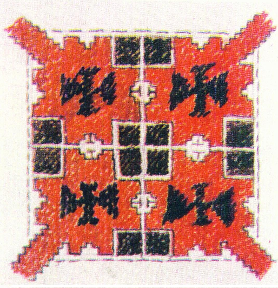 Орнамент [от] шевица от ръкав [на] носия из гр. Битоля. Шит върху памучен плат с цветни вълнени конци. Основният кръст в орнамента е бял, оставен от плата при шиенето; отстрани в ъглите му върху червен фон са извезани четирикрилни кръстчета, вертикалните им крила са тесни, а страничните широки и триъгълни. Скициран в естествена величина през април 1916 г.